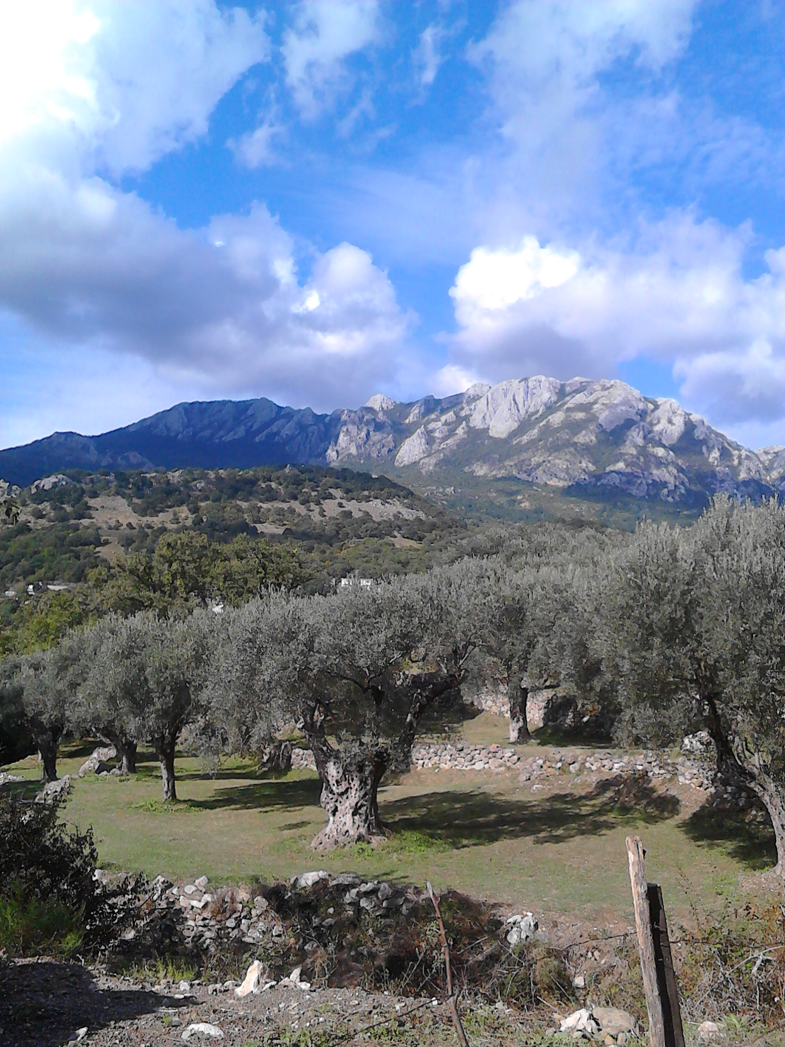 Маслињаци у селу Зупци, у даљини планина Суторман